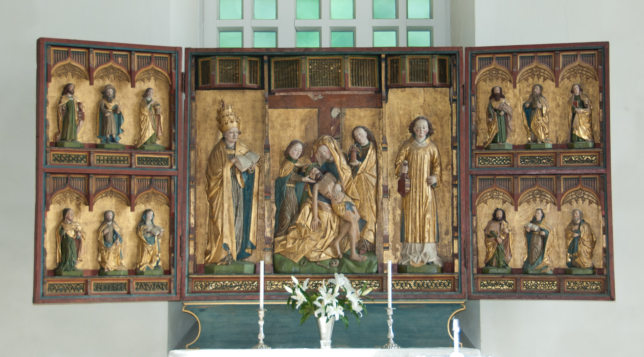 Altarskåp i Bollnäs kyrka, sannolikt tillverkat av Jordan Målare, Stockholm, till invigningen av kyrkan 1468